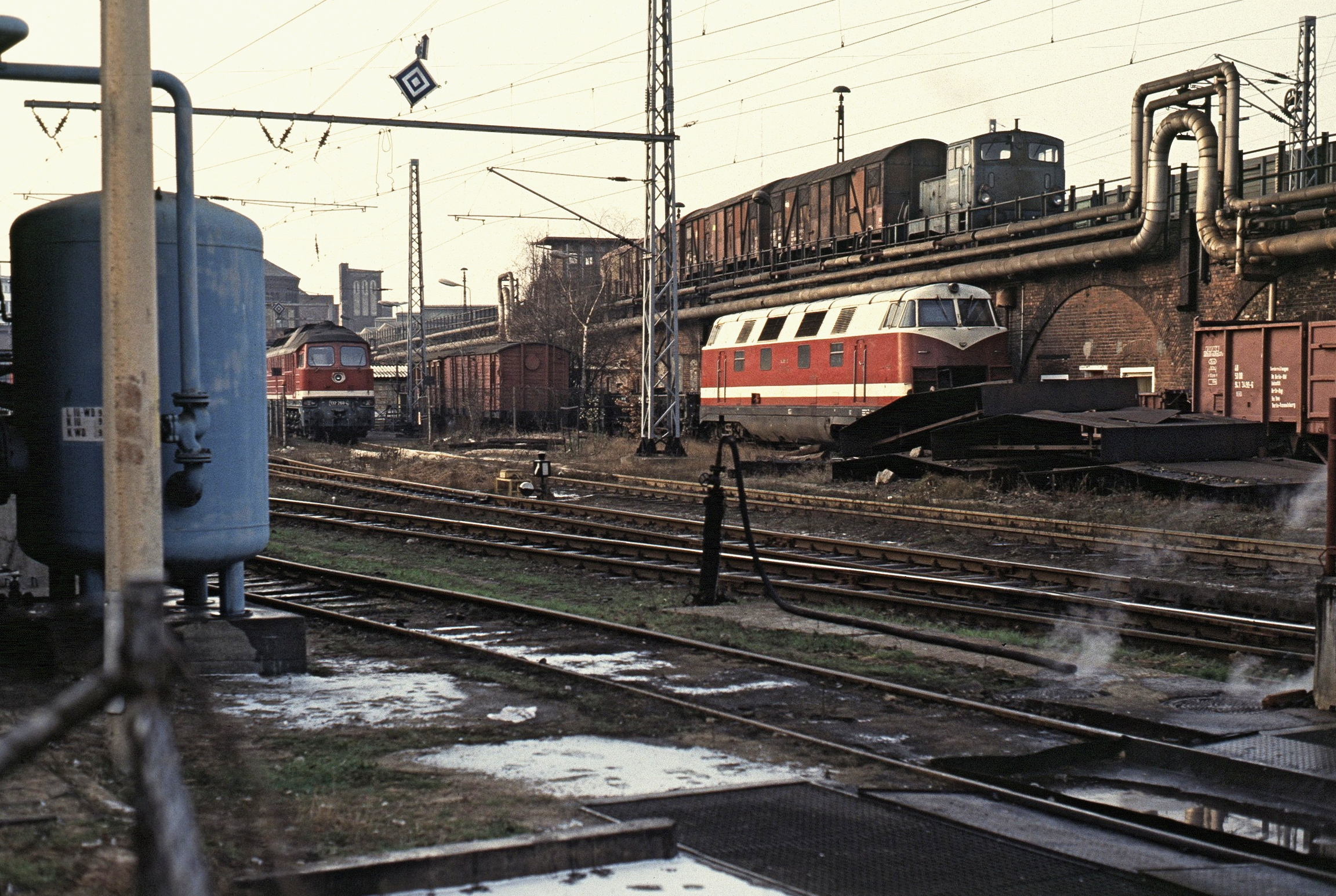 BW Berlin Ostbahnhof